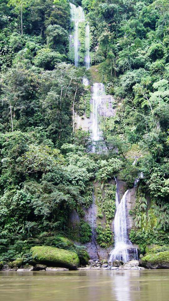 Los distintos pisos climáticos del cantón Camilo Ponce Enriquez permite que el cantón posea Cascadas cómo la del Río Juntas